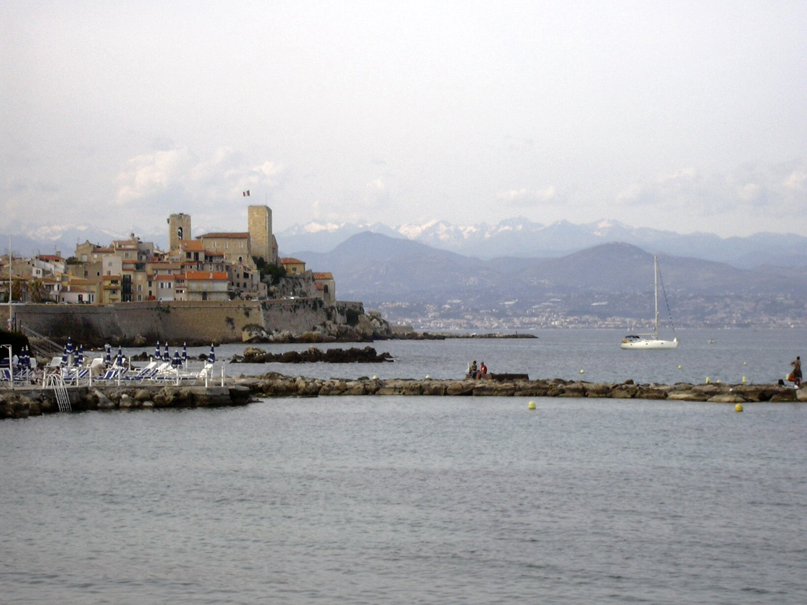 Antibes / remparts